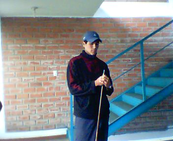 foto de victor en el billar